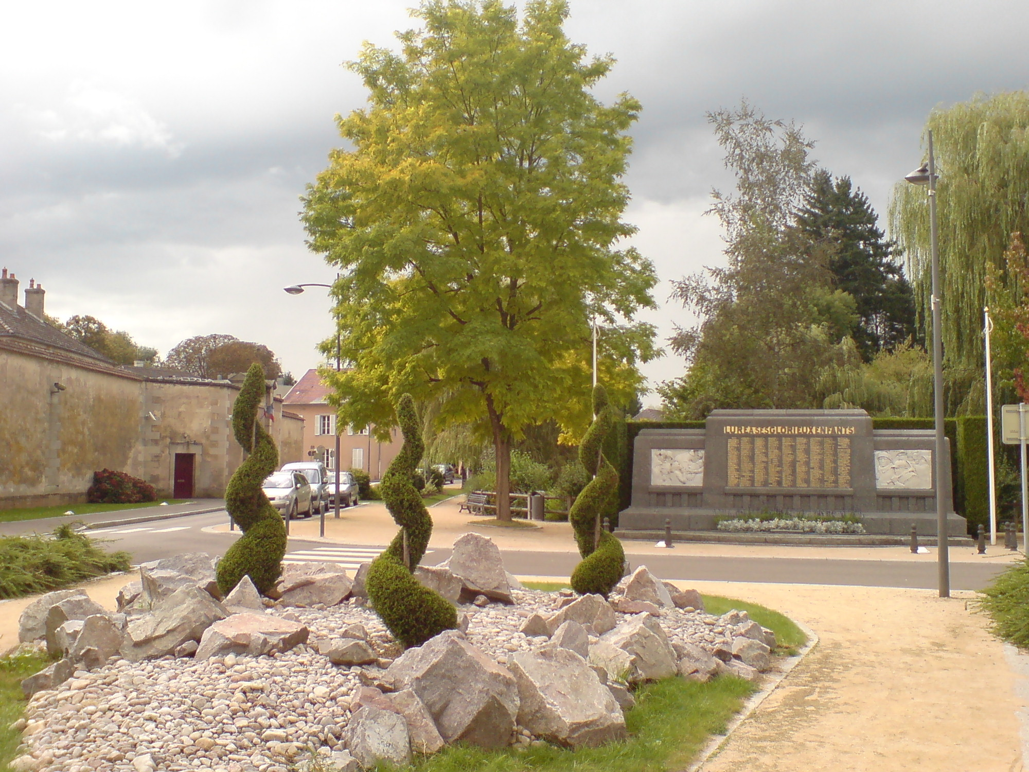 Agréments végétaux suite au réaménagement de la rue passant par la mairie.